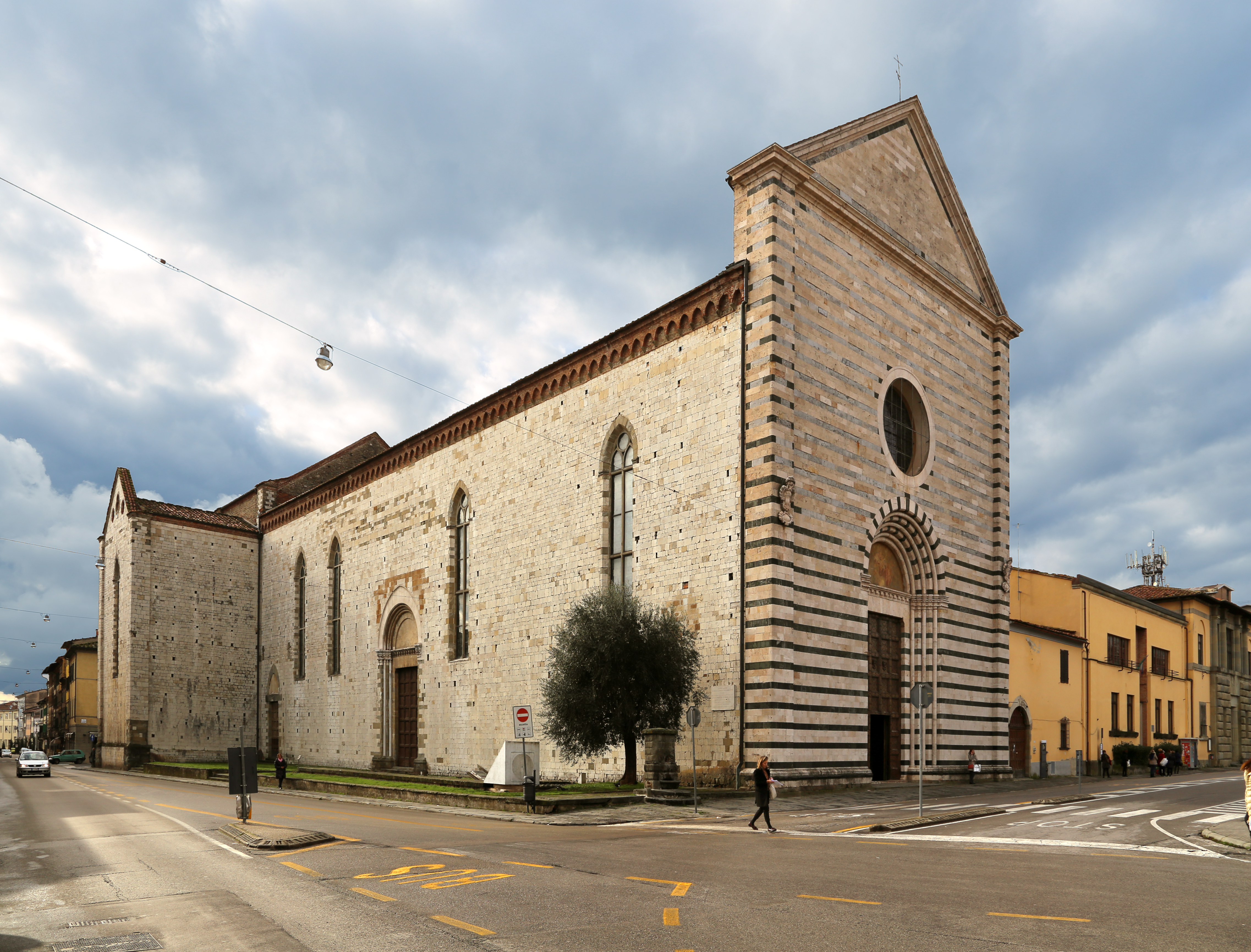 chiesa di San Francesco This is a photo of a monument which is part of cultural heritage of Italy.